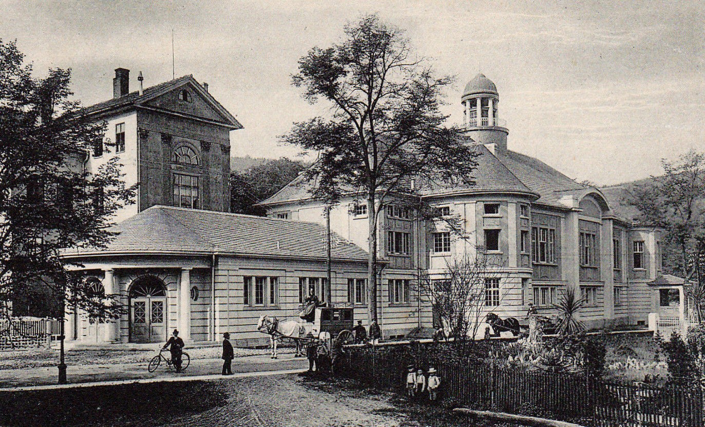 Von Karl Behlert errichteter Schützenhaussaal in Meiningen nach seiner Eröffnung 1913, links das Schützenhaus, heute Volkshaus und Volkshaussaal genannt.